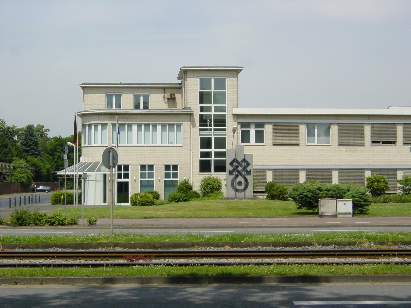 Bildbeschreibung: Küsters Hauptverwaltung, Krefeld Quelle: selbst fotografiert Datum: 18.06.2006 Fotograf/Zeichner: DER UNFASSBARE